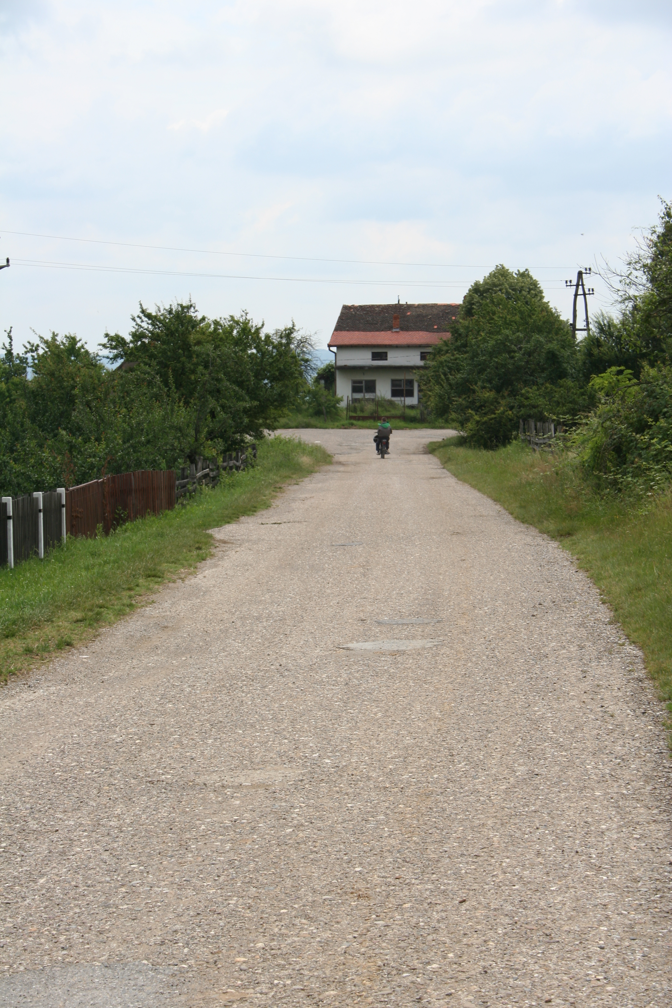 Kozarica, centar sela